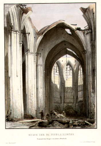 Martin Gensler: Ruine der St. Nicolaikirche. Transport des Sarges von Jobst von Overbeck. Kolorierte Kreidelithographie von Martin Gensler, teils eiweißgehöht.